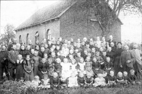 Bild von 1898 //Archiv EFG Westerstede // public domain